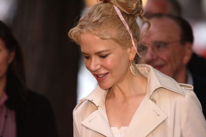 Nicole Kidman, ganadora del premio en 2001 y 2002.